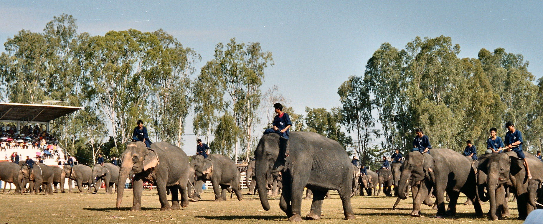 Olifantenfestival Surin 16.11.2002 Zelf met eigen digitale camera gemaakte opname.